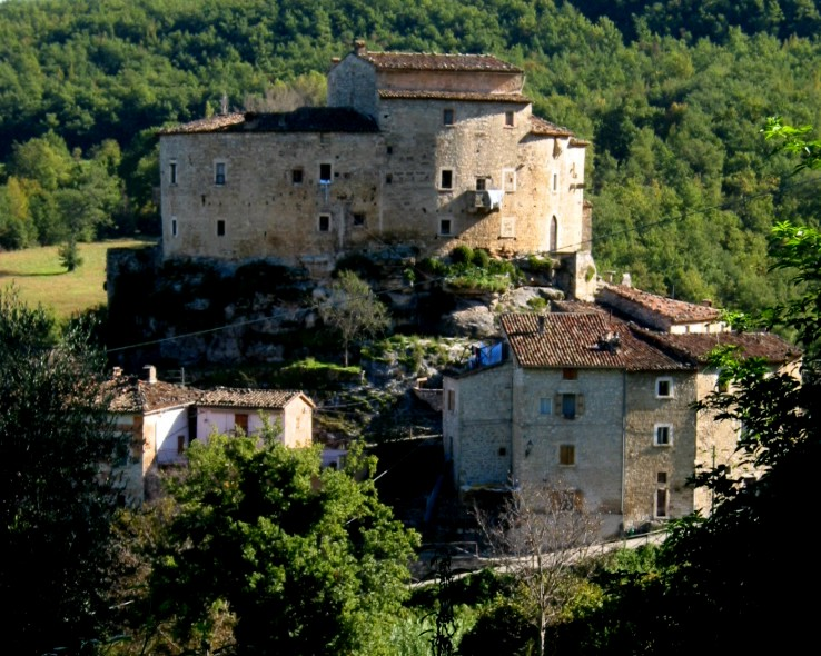 Acquasanta Terme, Marche, Italia